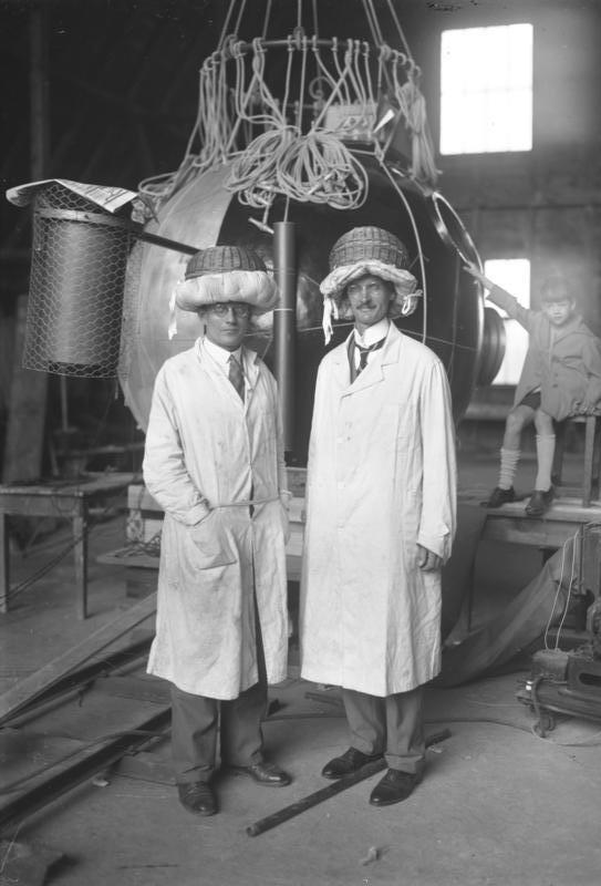 Prof. Piccard wieder fertig zu seinem grossen Stratosphären-Flug! Der Brüsseler Prof. August Piccard (rechts) und sein Begleiter, der Schweizer Ing. Kipfer (links) mit ihrem aus Nähkörben verfertigten Sturzhelmen vor der Kugel, fertig zum Stratosphärenflug in 16.000 m Höhe.